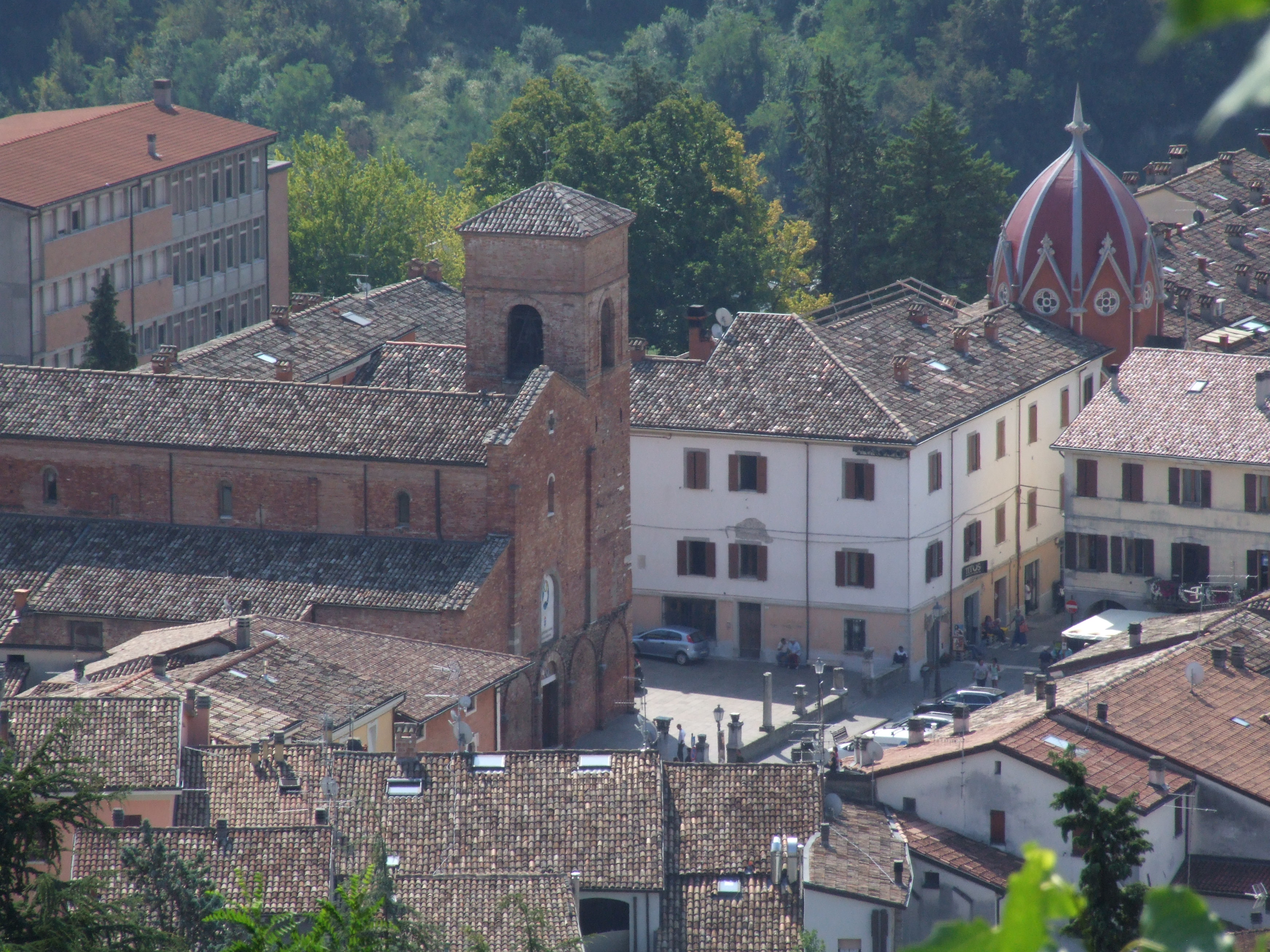 Basilica concattedrale di Sarsina This is a photo of a monument which is part of cultural heritage of Italy.